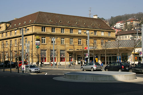 Bahnhof Neuchâtel